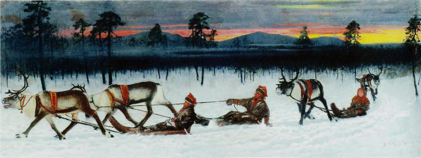 Juho Kyyhkysen maalaus Pororaito eli Lappalaisia matkalla, maalattu Sodankylän Muteniassa talvella 1902. Maalauksen omistaa Rovaniemen kaupunki.